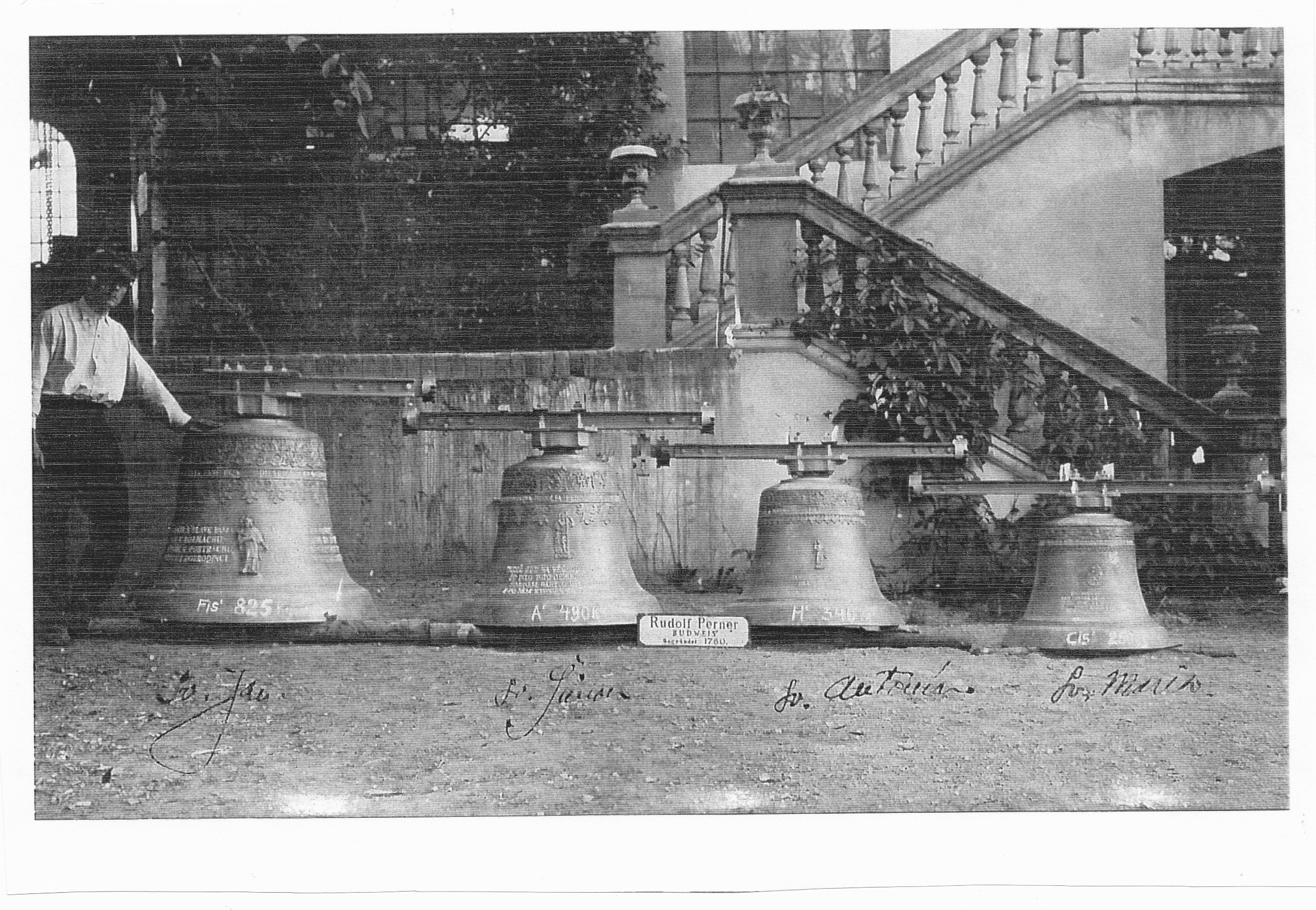 Foto původních zvonů